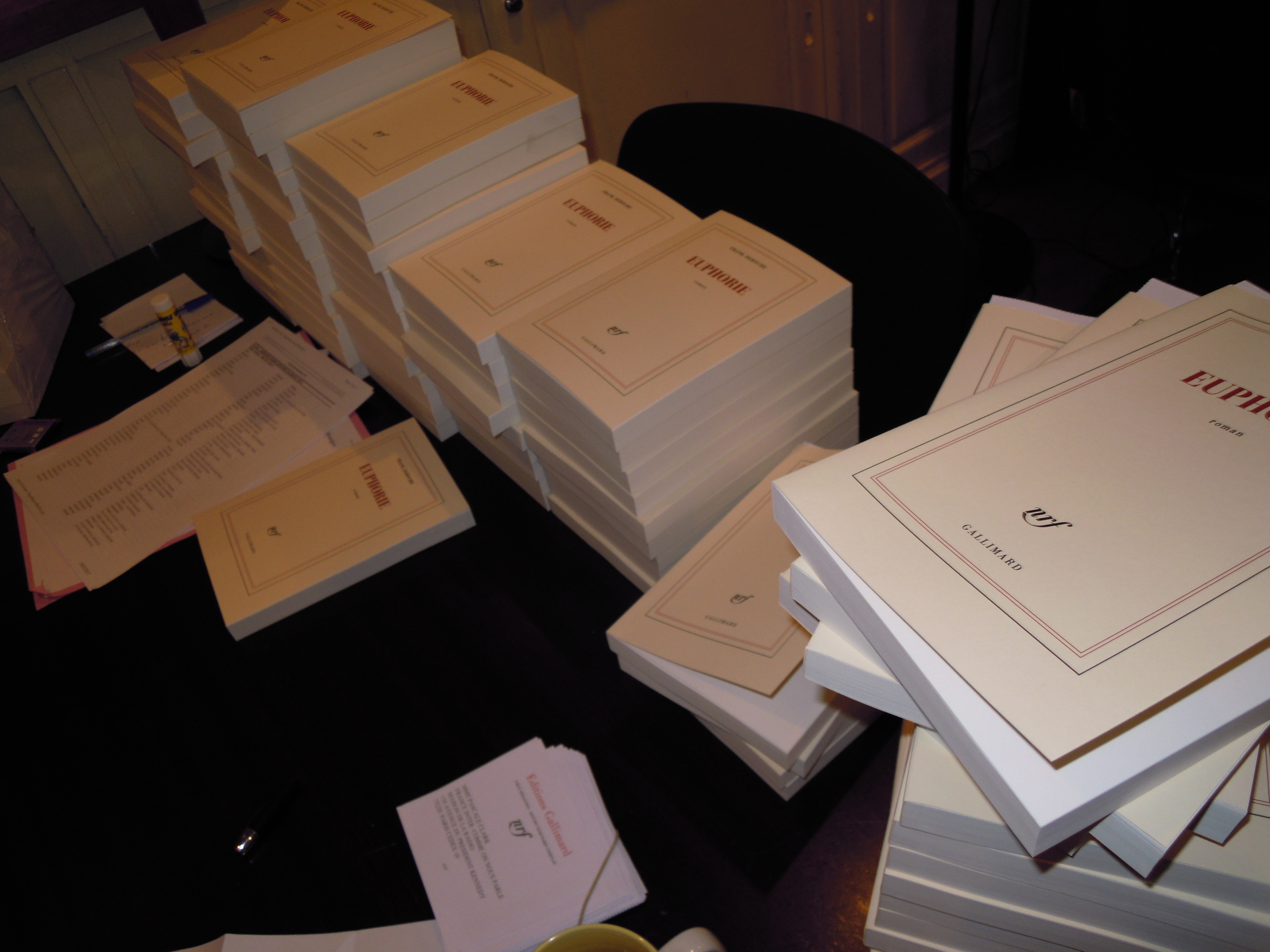 Roman Euphorie de Frank Deroche